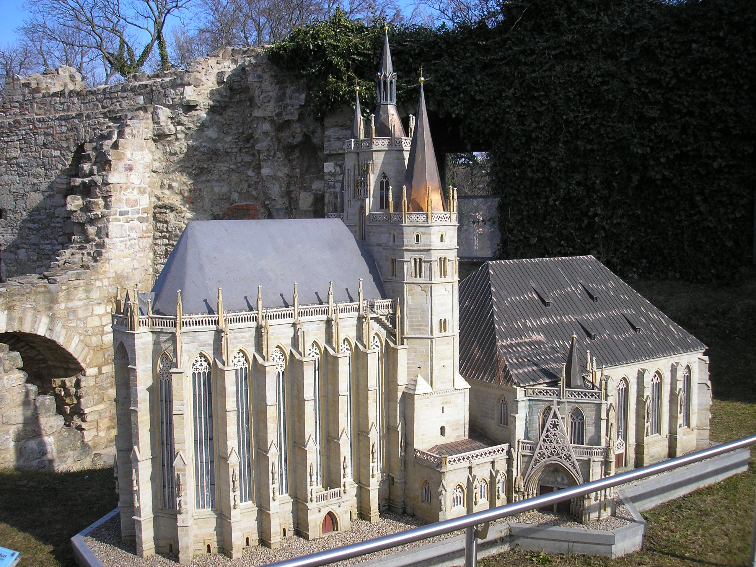 Das Modell des Erfurter Doms in der Schlossruine in Arnstadt (Thüringen).